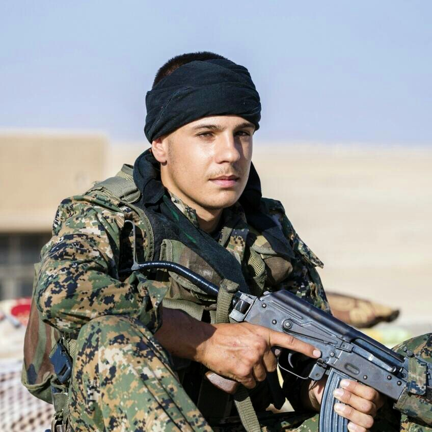 Damien YPG